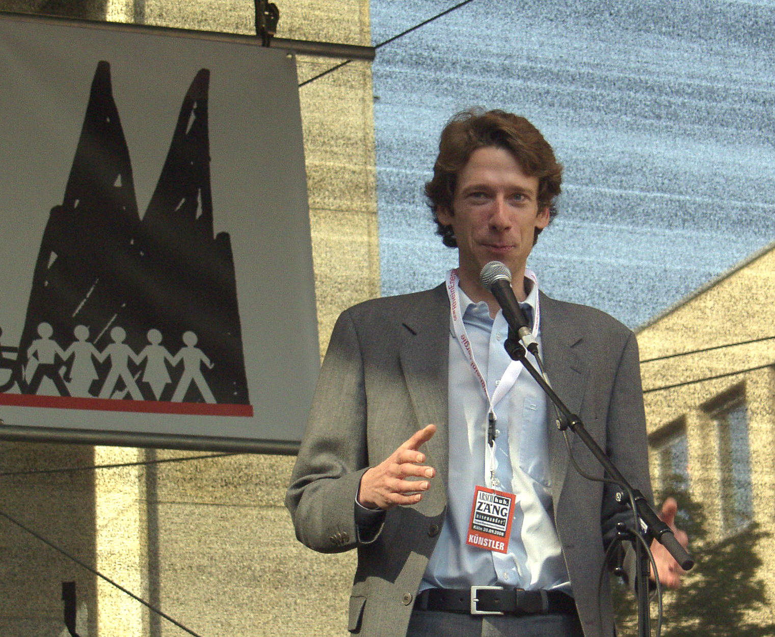 Konstantin Neven DuMont auf der politischen Demonstration „Köln stellt sich quer“ gegen den so genannten „Anti-Islamisierungskongress“ der rechtsgerichteten Partei „Pro Köln“ vor dem Gürzenich in Köln.